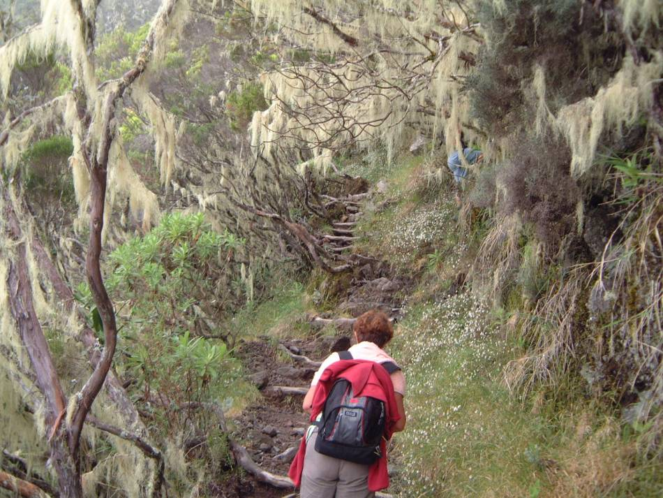 Photo prise par Nerijp le 25 novembre 2005. Elle est libre de droit d'après cette page.